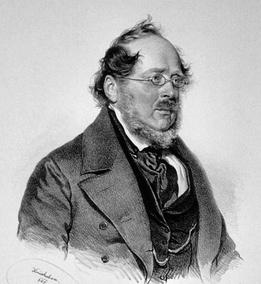 Friedrich List, Lithographie von Josef Kriehuber, 1845